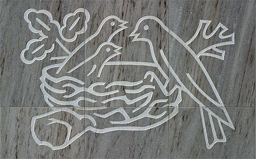 Markenzeichen von Nestlé